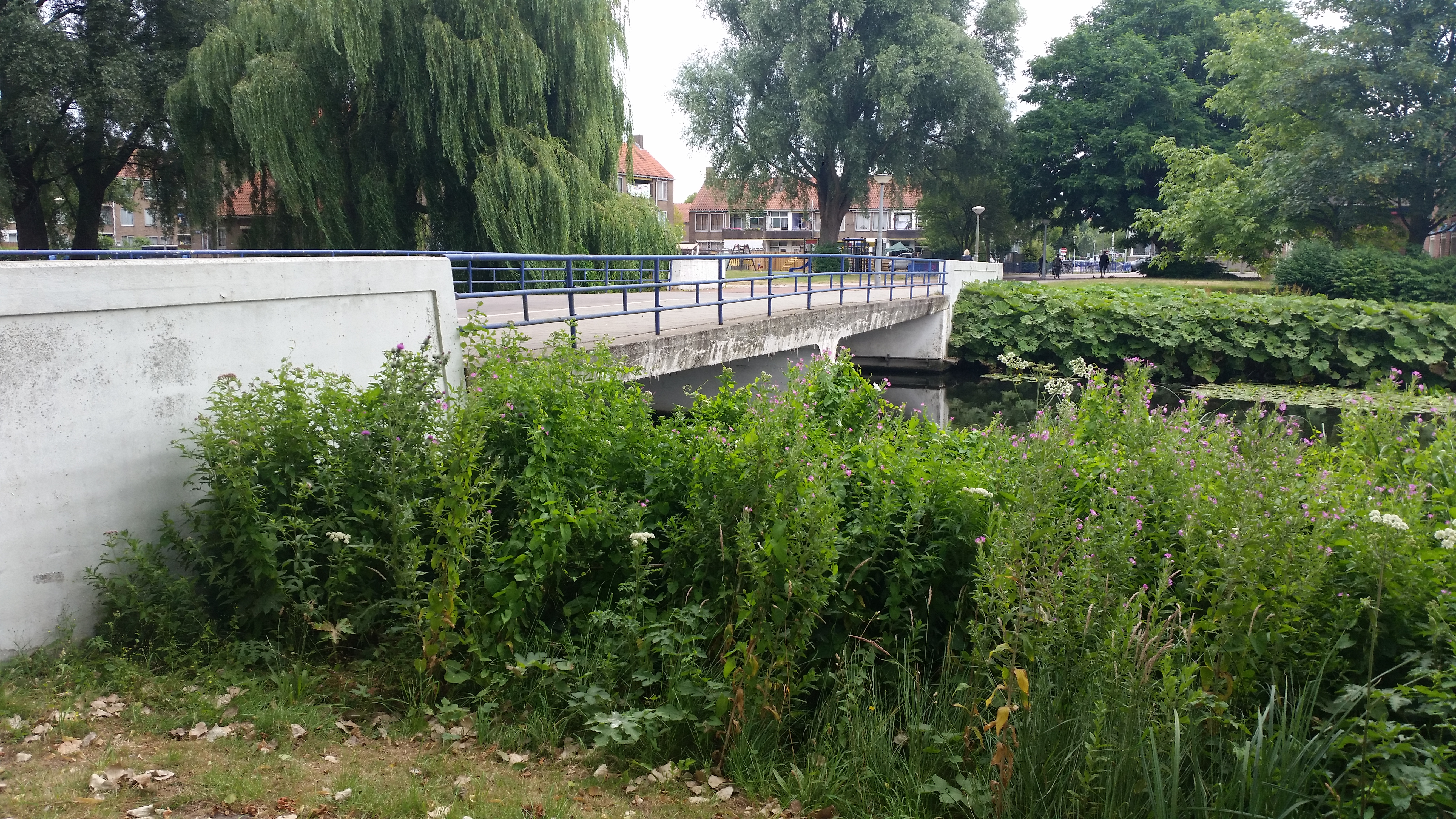 de overspanning van brug 651 nabij het Eendrachtspark, Amsterdam